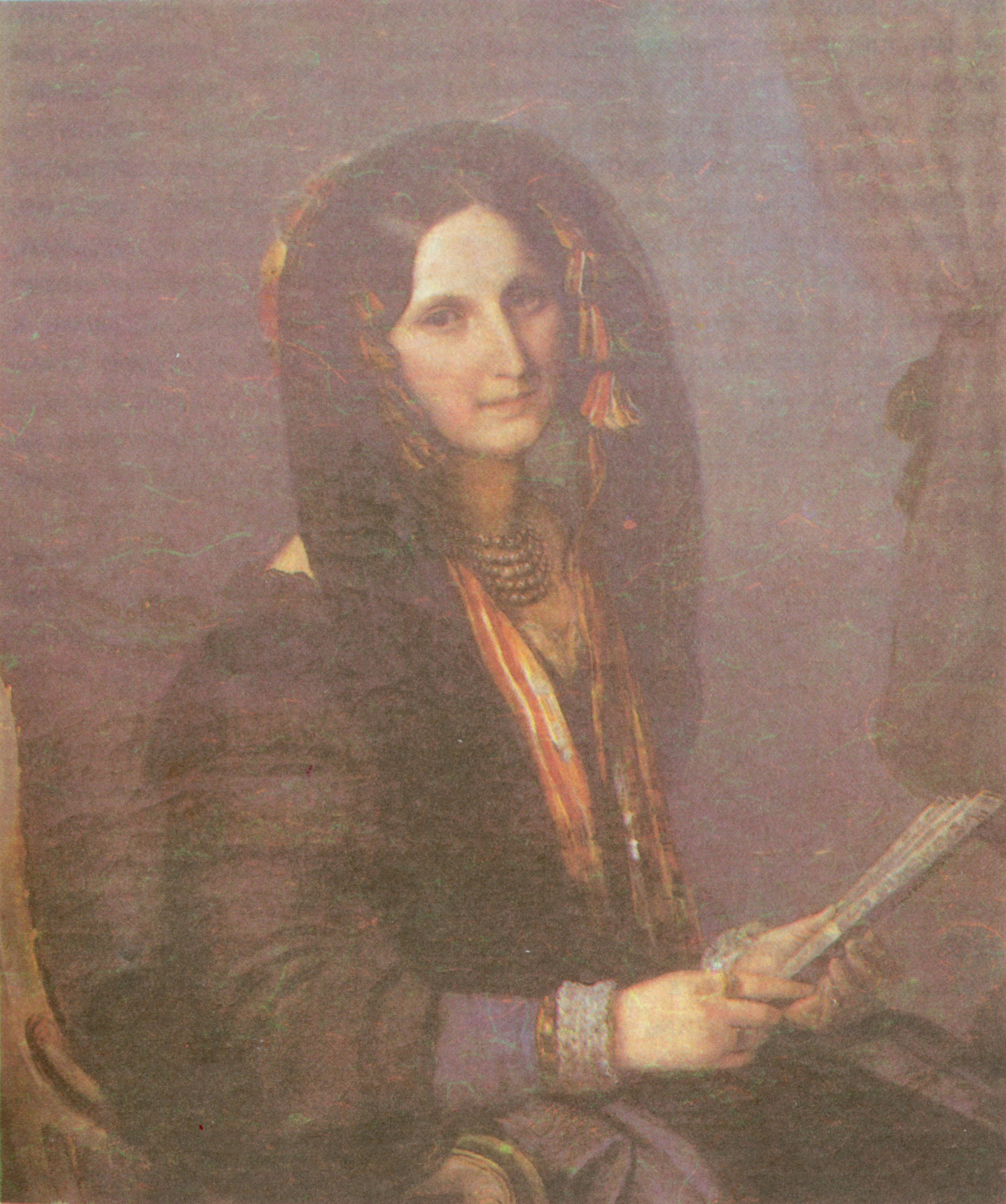 Dorothea de Ficquelmont (1804–1863)